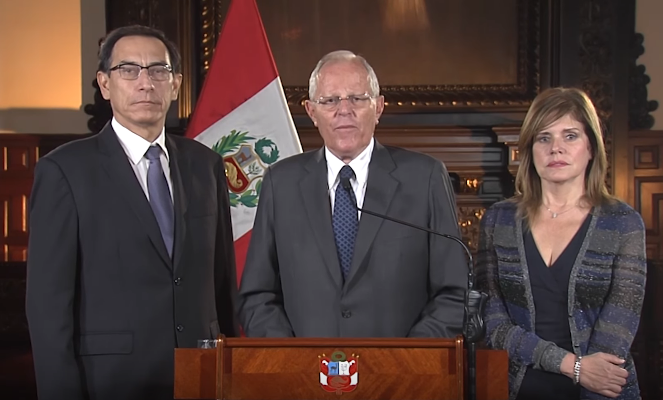 O presidente do Peru, Pedro Pablo Kuczynski, ao lado de seus vice-presidentes, Martín Vizcarra e Mercedes Aráoz, discursa sobre seu processo de impeachment.